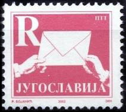 Почтовая марка Югославии для заказных писем, выпущенная для Черногории